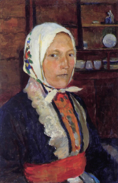 Картины Юлия Юльевича Блюменталч (1870—1944) — русского, советского живописеца, графика, одного из основоположников башкирского профессионального изобразительного искусства.